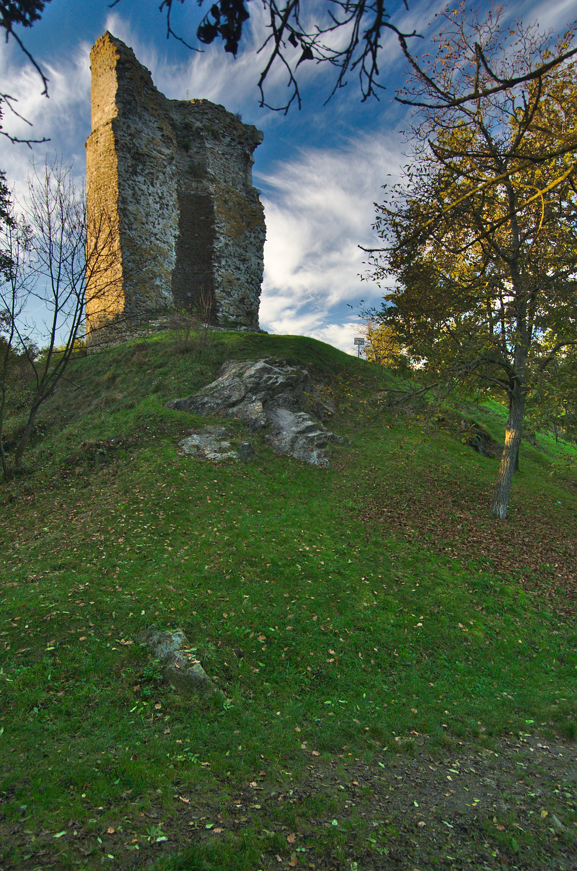 Dolní hrad, Otaslavice, okres Prostějov